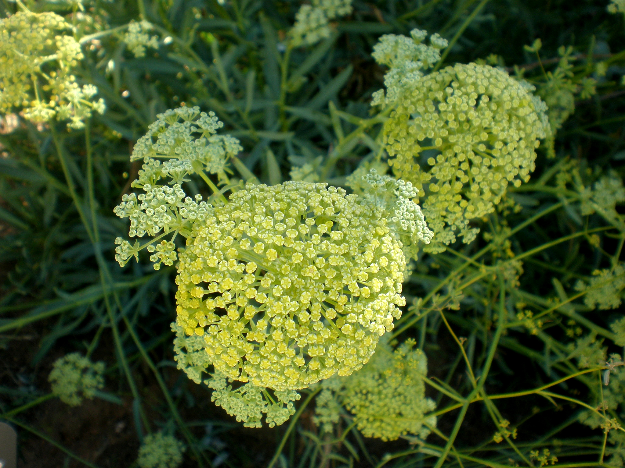 Jardín Botánico de Barcelona.